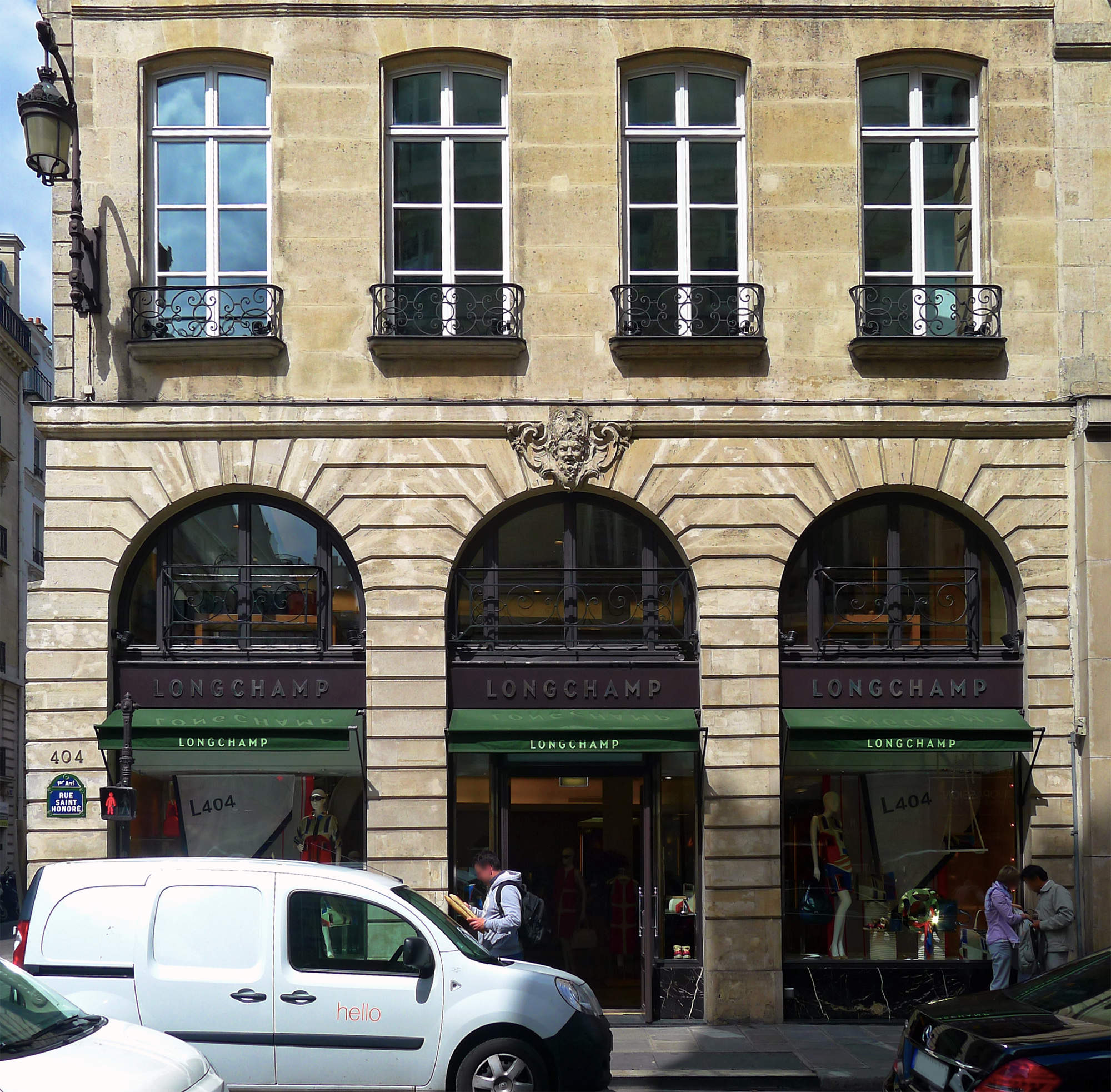 Immeuble (Inscrit) - n°404 rue Saint-Honoré - Paris Ier .